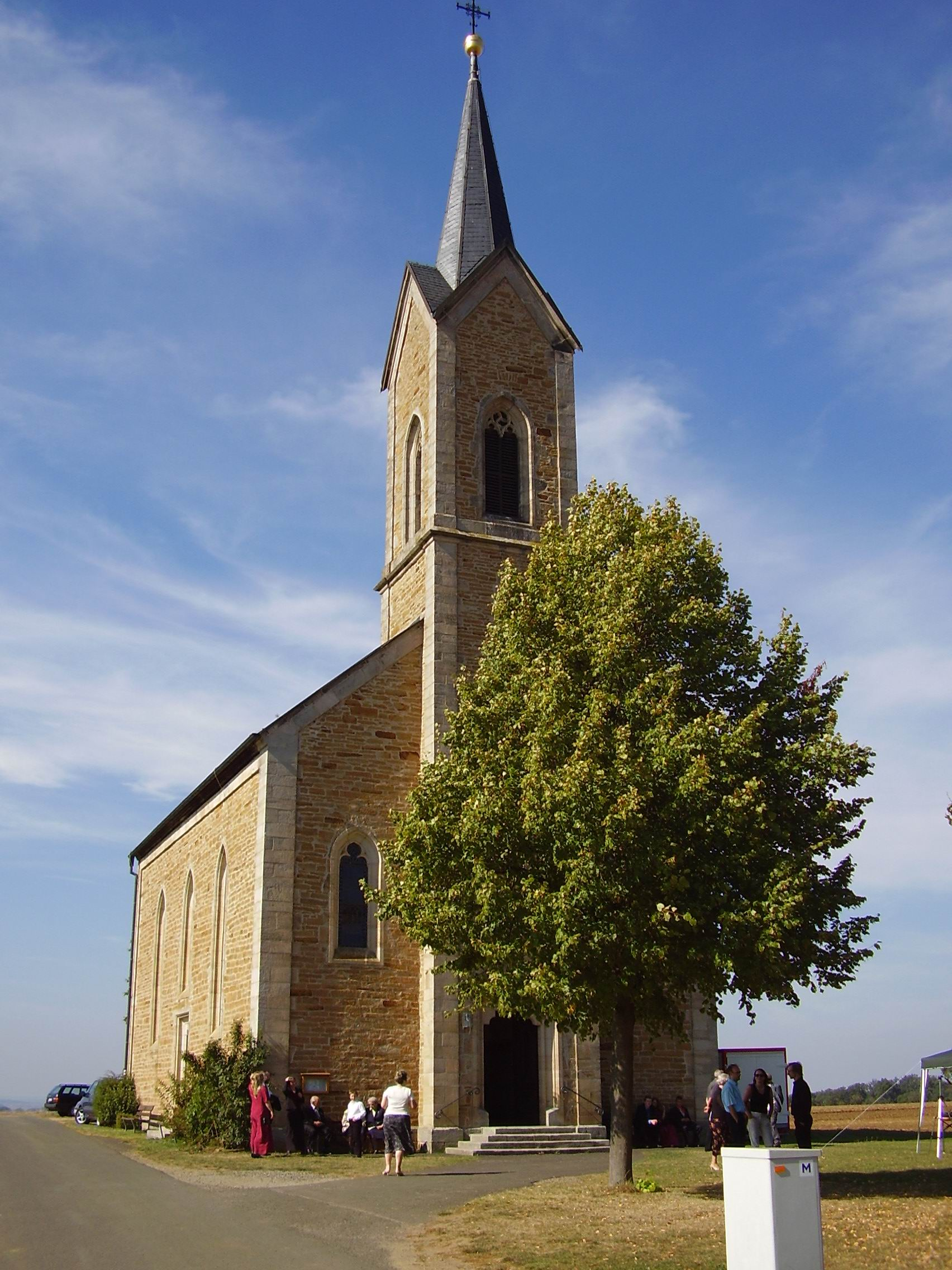 Wallfahrtskirche St. Maria, Helferin der Christen in Bischwind bei Gerolzhofen in Unterfranken (Bayern)